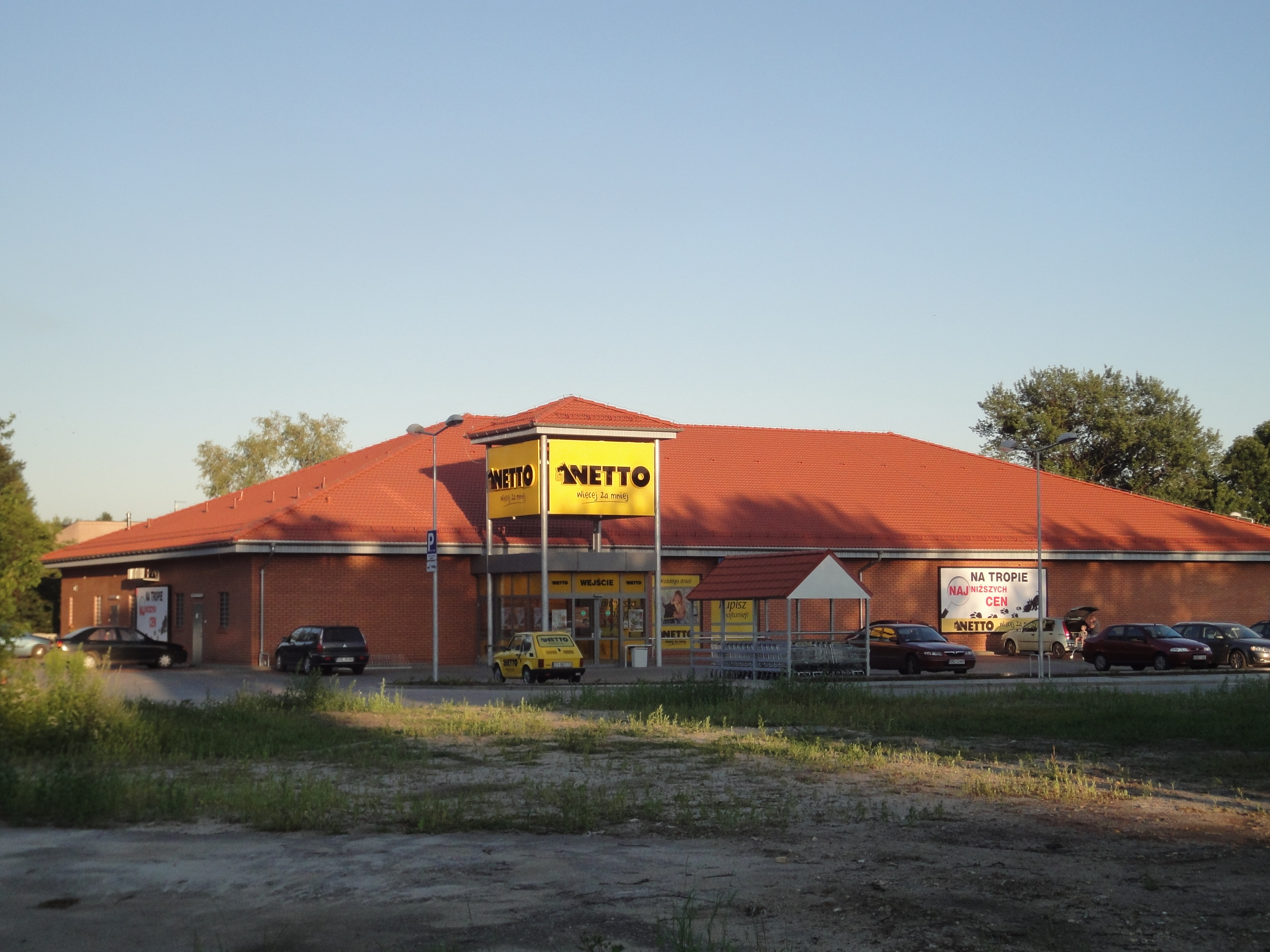 Dyskont spożywczy duńskiej sieci Netto znajdujący się w Wojkowicach przy ulicy Sobieskiego